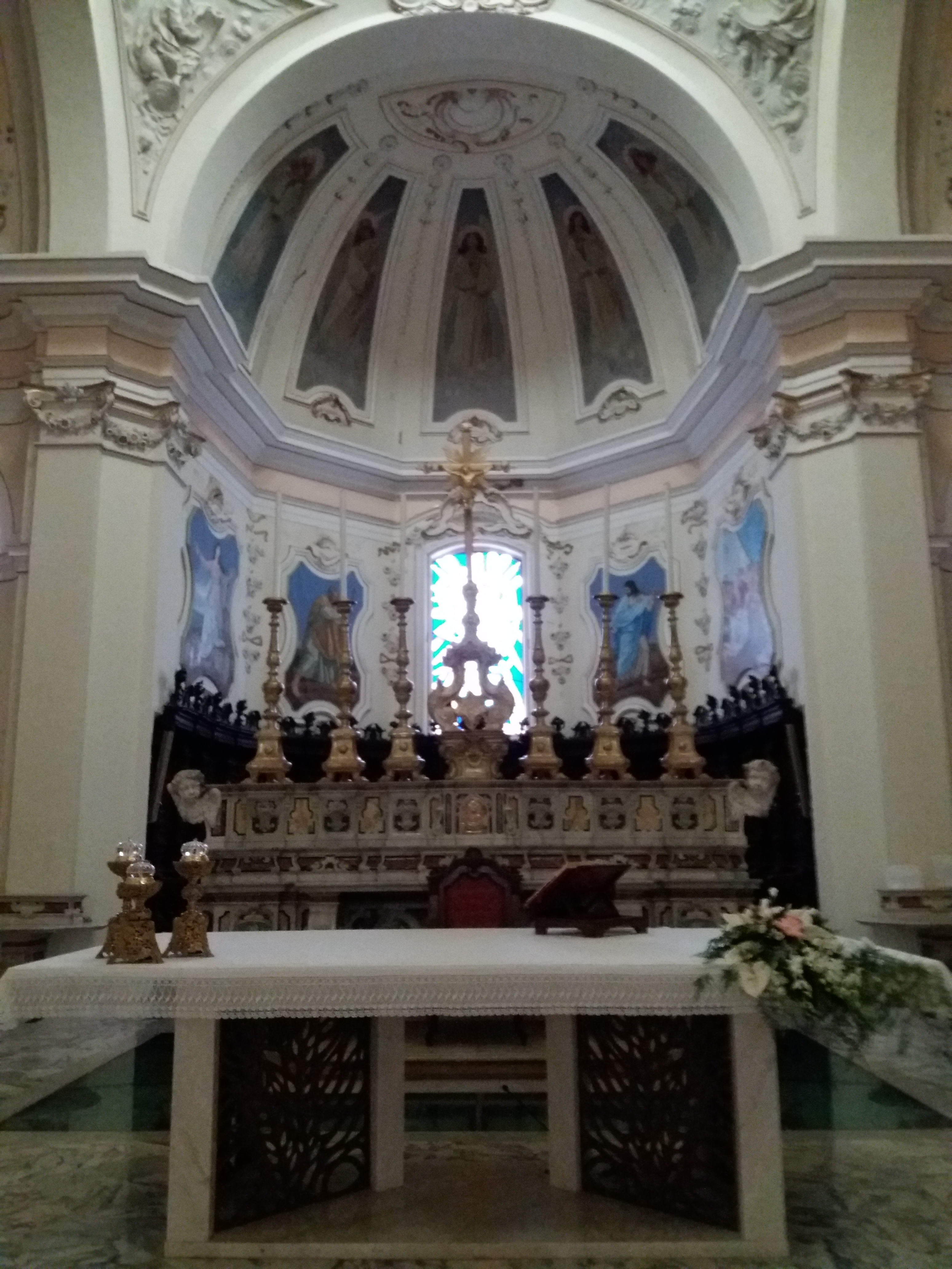 Sulmona: Cattedrale di San Panfilo